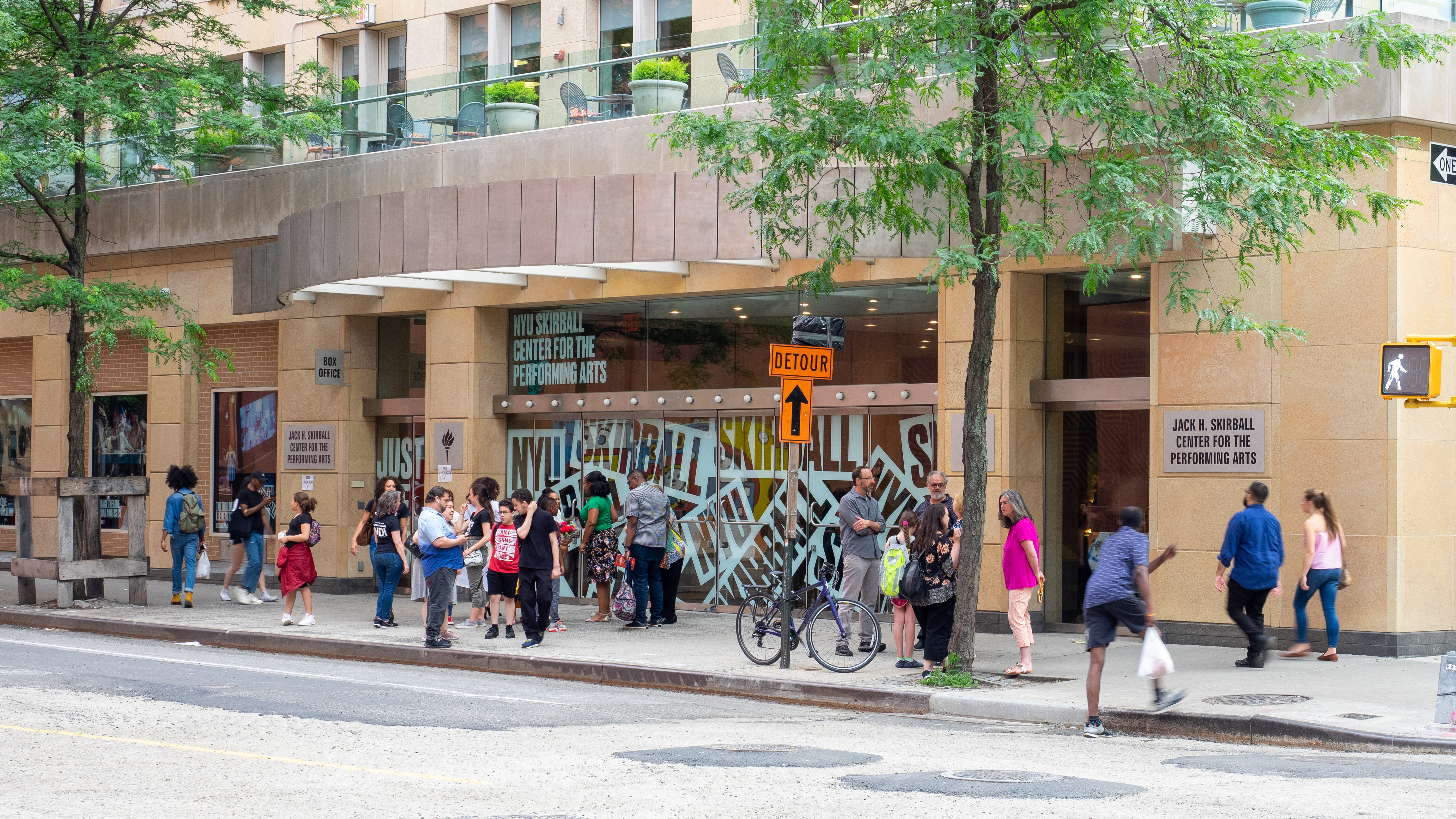 NYU, Greenwich Village, NYC